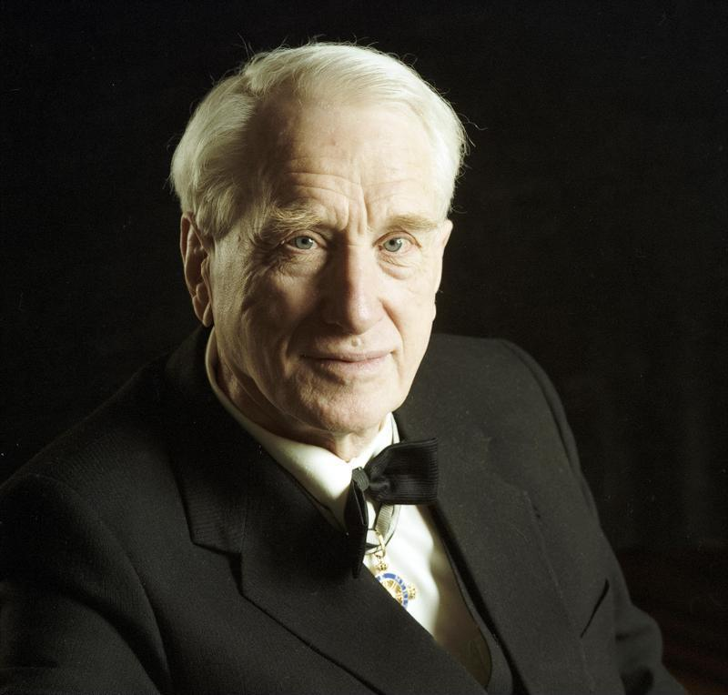 6.6.1988 Boris Borissowitsch Piotrowskij (UdSSR) Archäologe und Kunsthistoriker Mitglied des Ordens Pour le Mérite für Wissenschaften und Künste